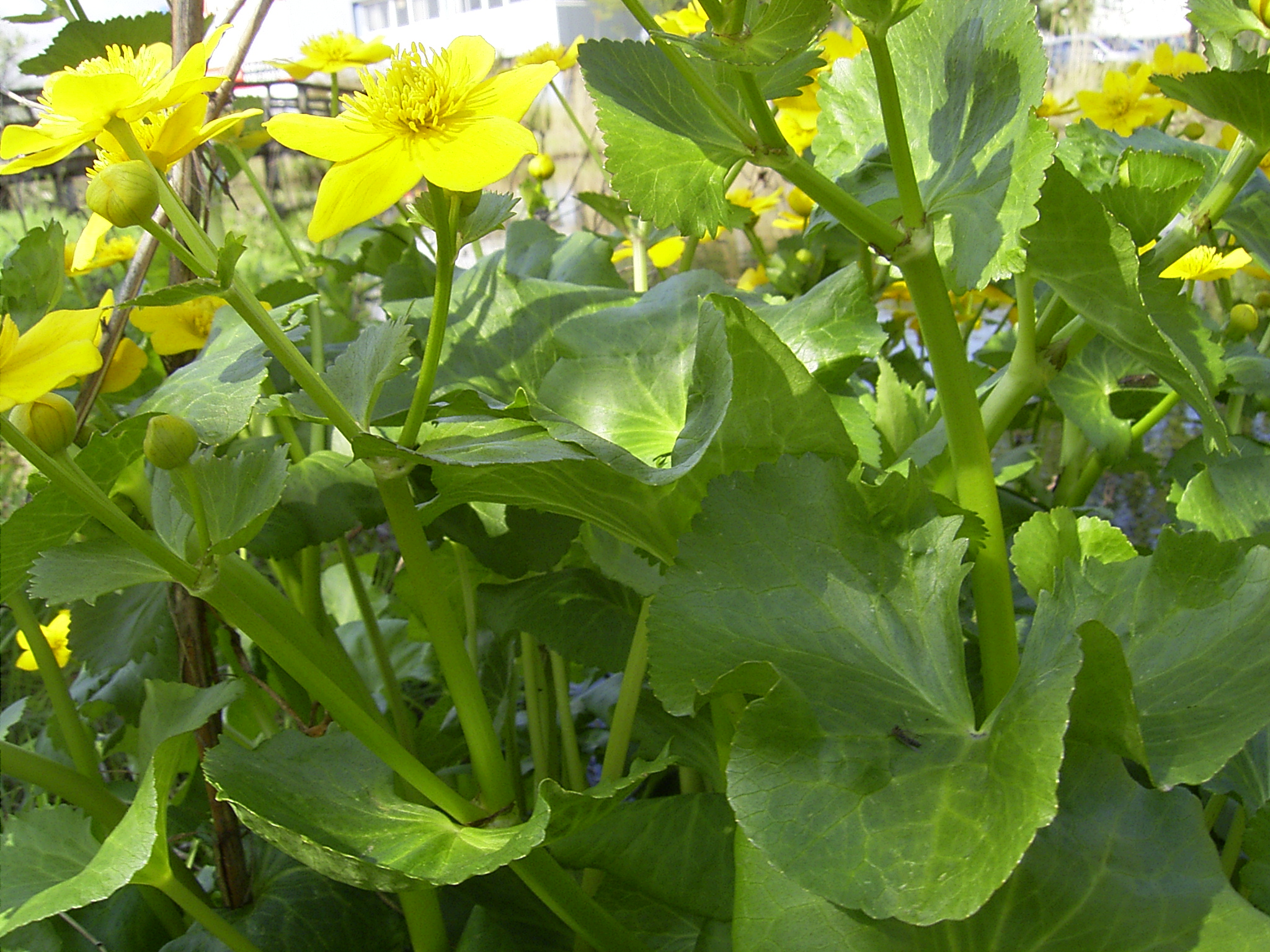 Caltha palustris, eigen foto, 20 april industriegebied goudse poort, gouda